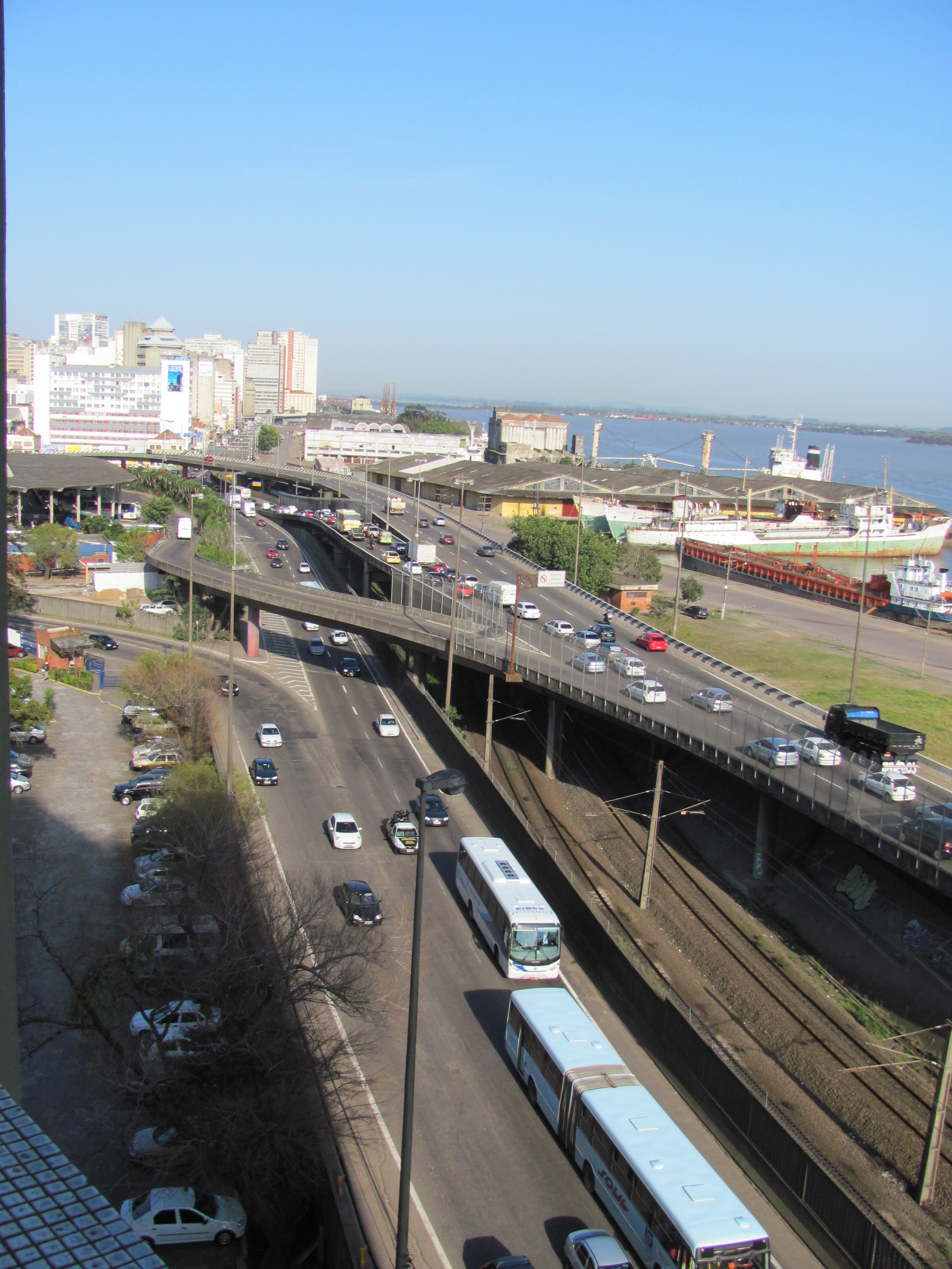 Panorâmica a partir da rodoviária de Porto Alegre